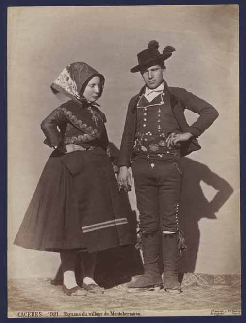 Caceres. Paysans du village de Montehermoso.